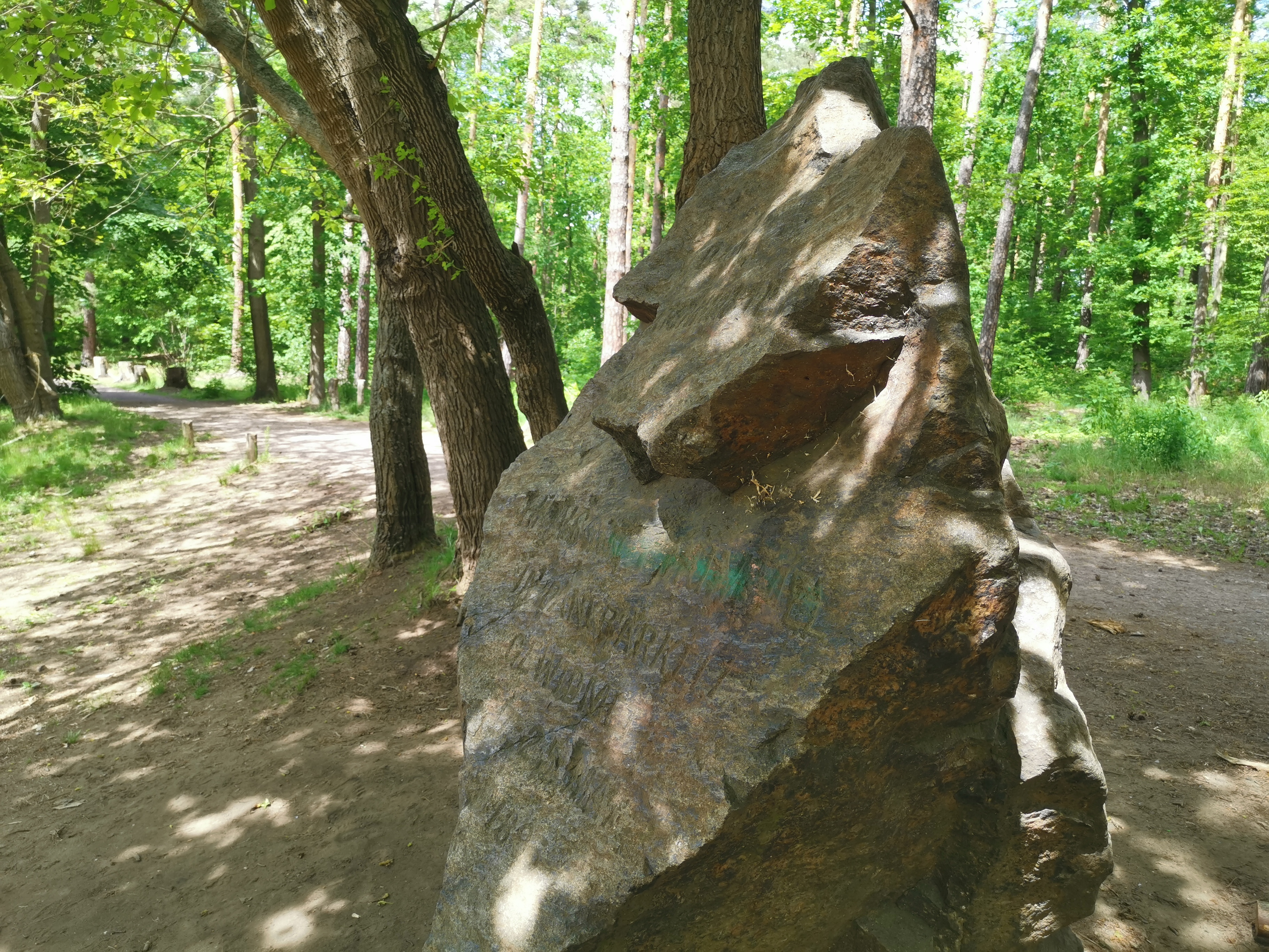 Denkmal für Staatsminister Thümmel in der Dresdner Heide am Waldspielplatz